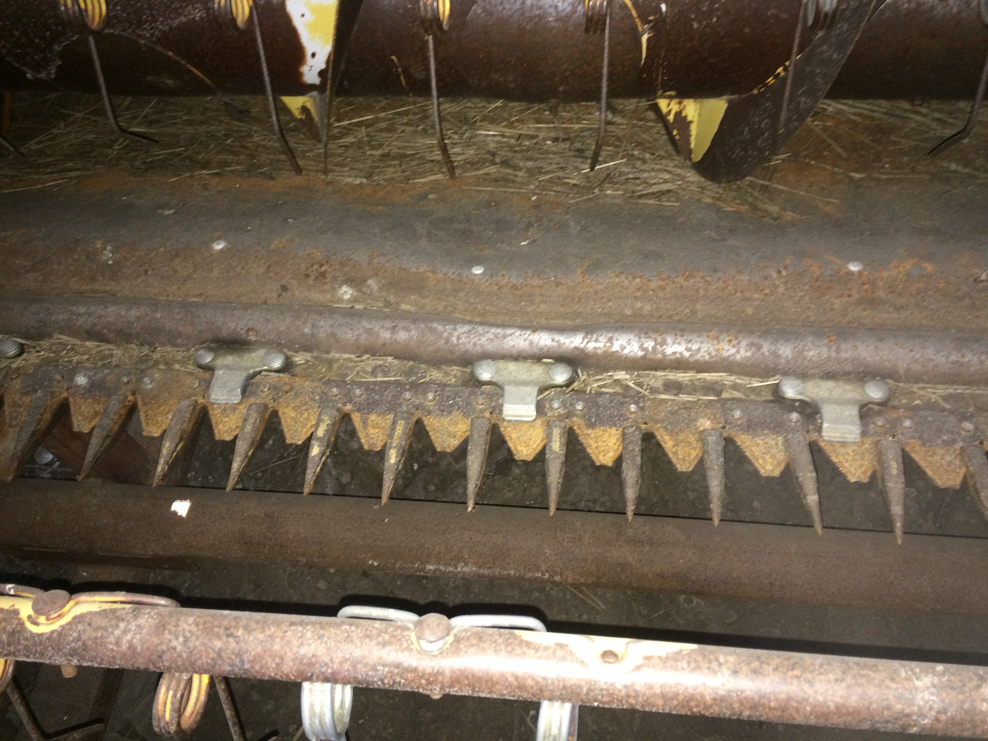 Lõiketerad liiguvad lõikesõrmede vahel